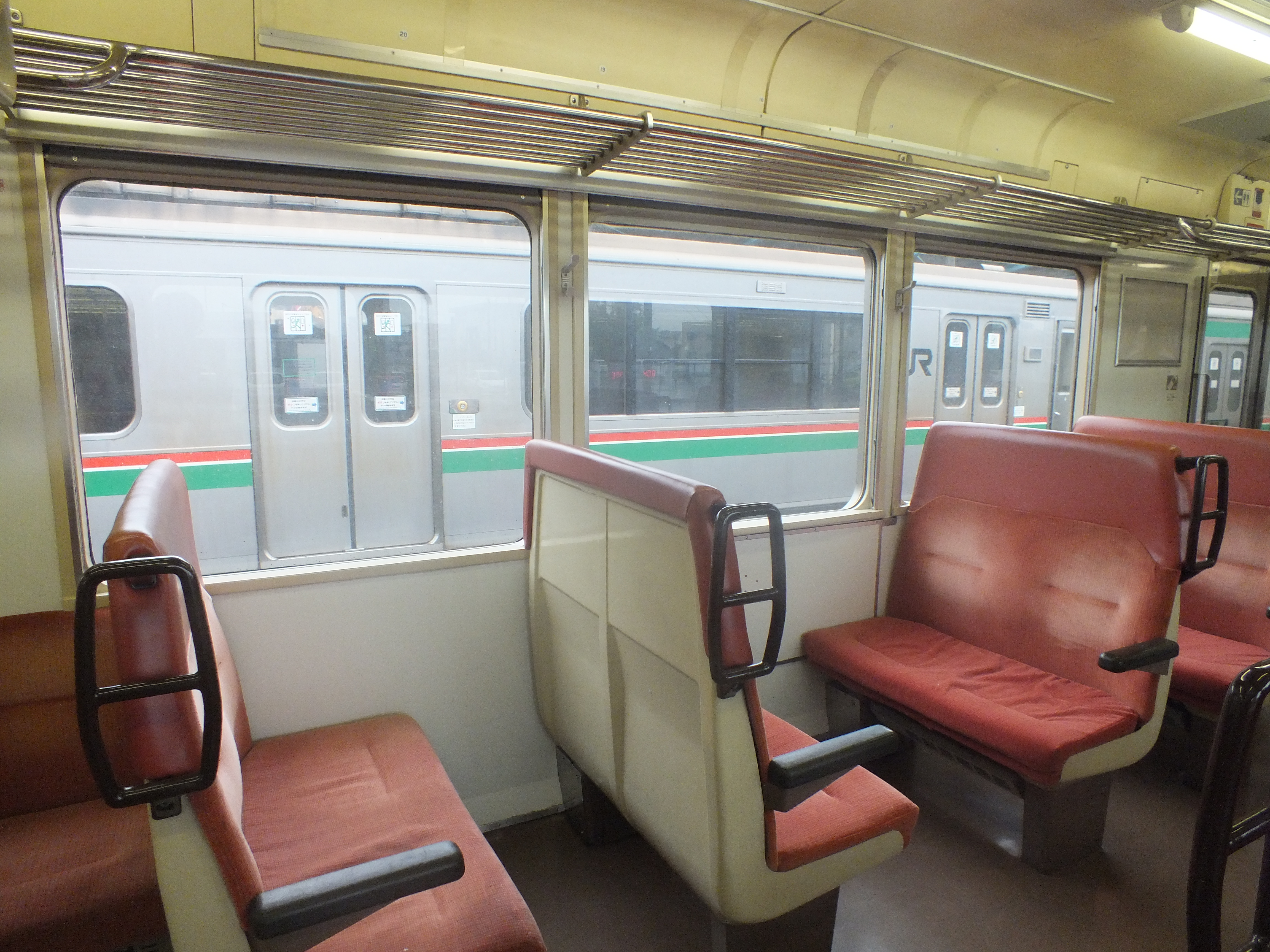 719系の集団見合い型セミクロスシート。常磐線列車にて撮影。